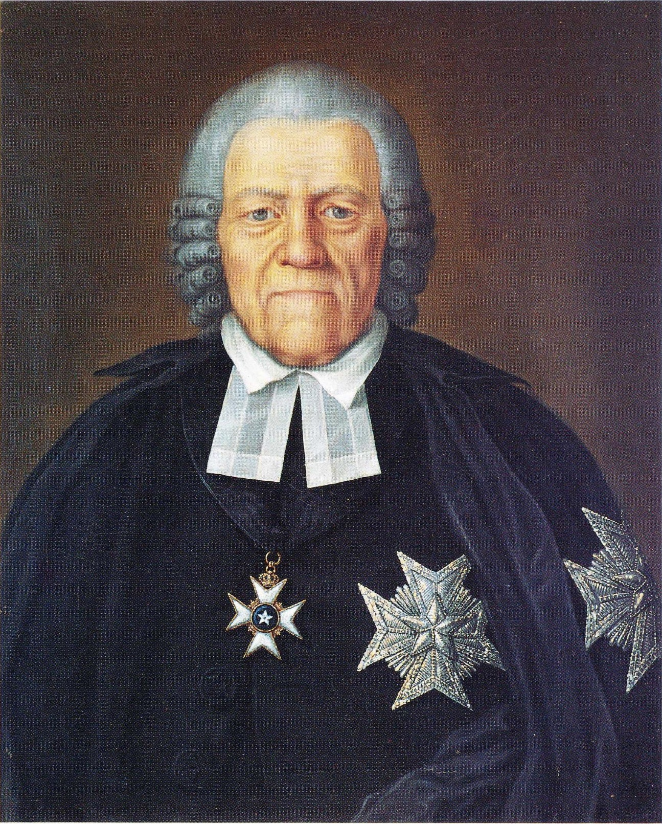 Turun piispa Jacob Gadolin (1719–1802). Johan Erik Hedbergin maalaama muotokuva on vapaasti toteutettu kopio C. F. von Bredan vuonna 1800 maalaamasta Gadolinin muotokuvasta, jossa hän katsoo sivullepäin. Muotokuva kuuluu Helsingin yliopiston kokoelmiin.